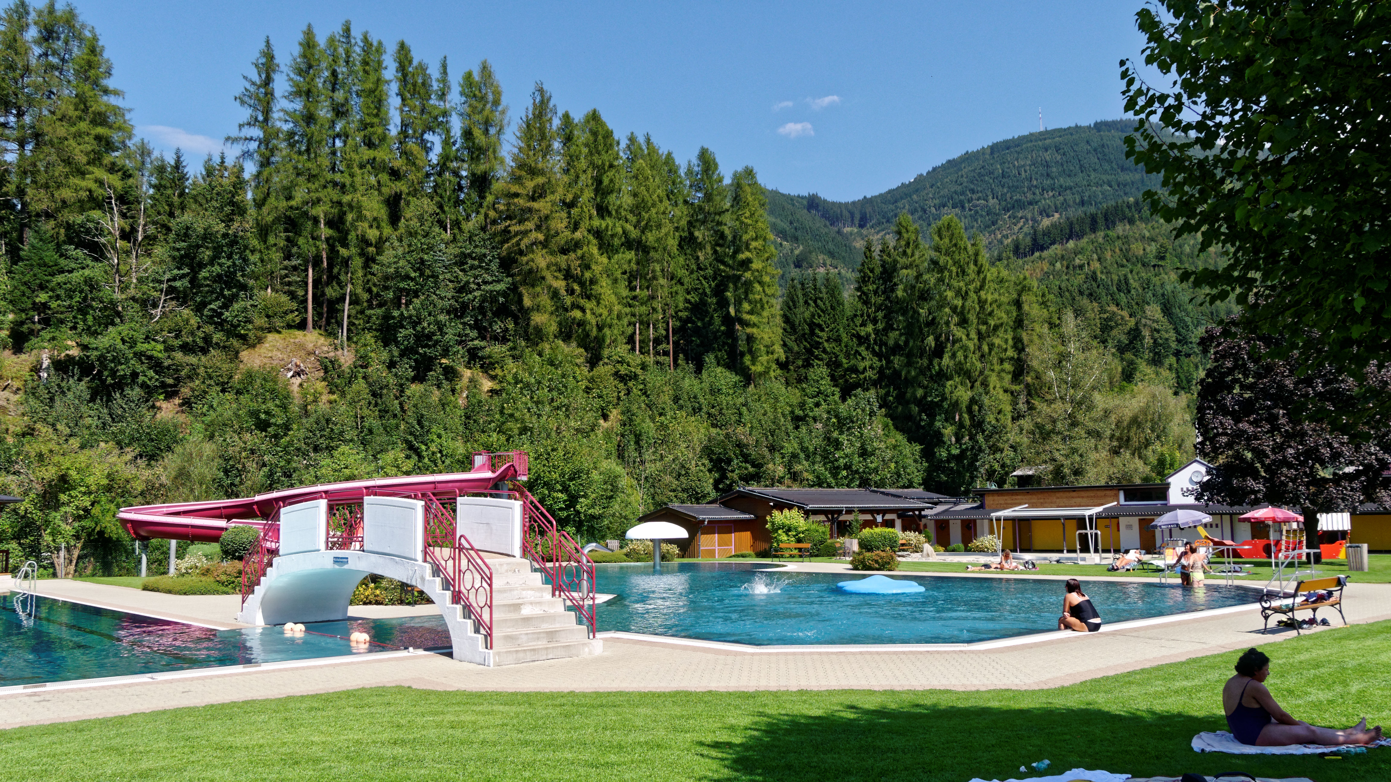 Schlossbad in Bruck an der Großglocknerstraße